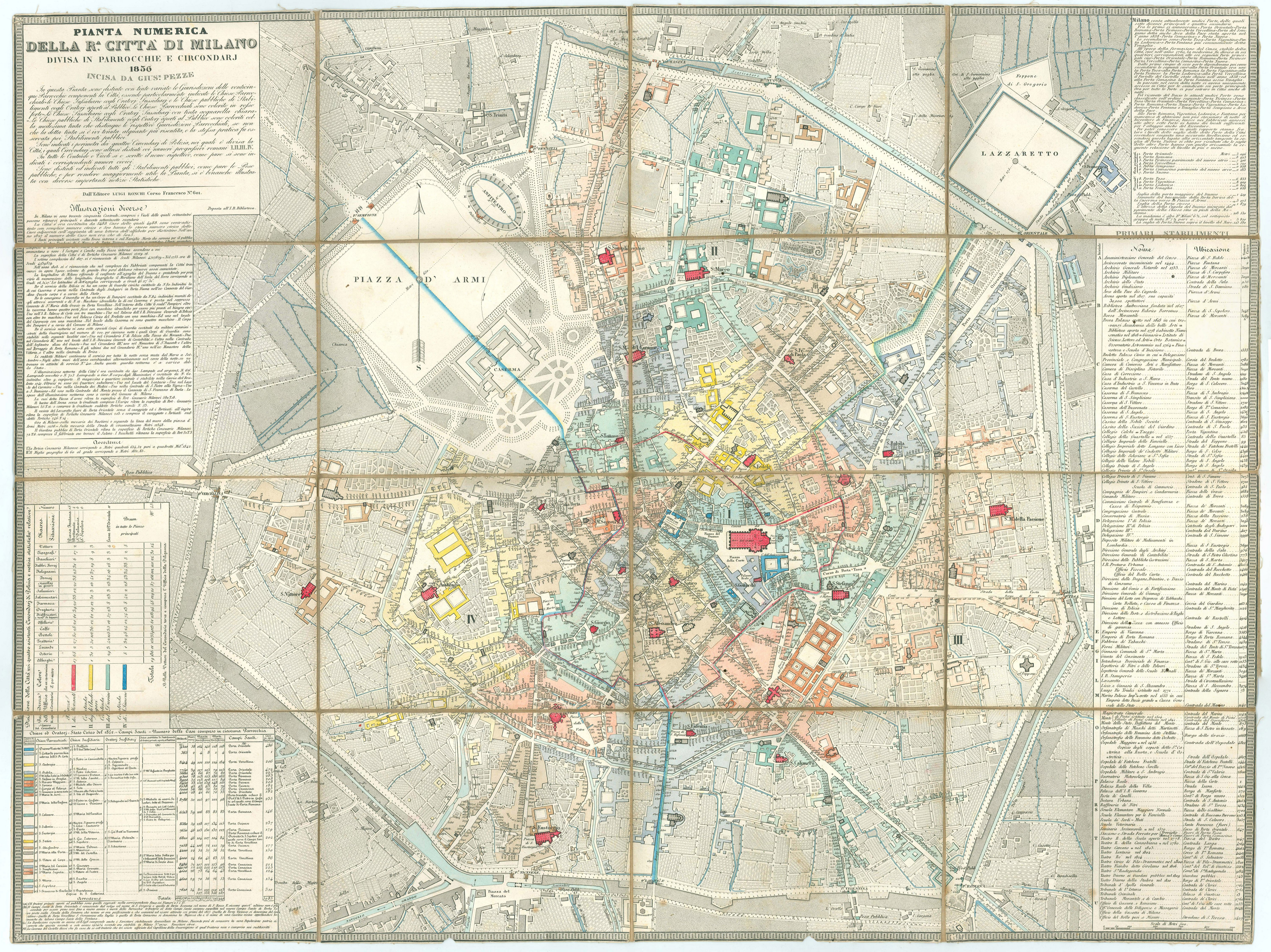 Carta numerica di Milano di Giuseppe Pezze (1856) La carta è presente su ed è conservata presso la Biblioteca Comunale Manfrediana di Faenza